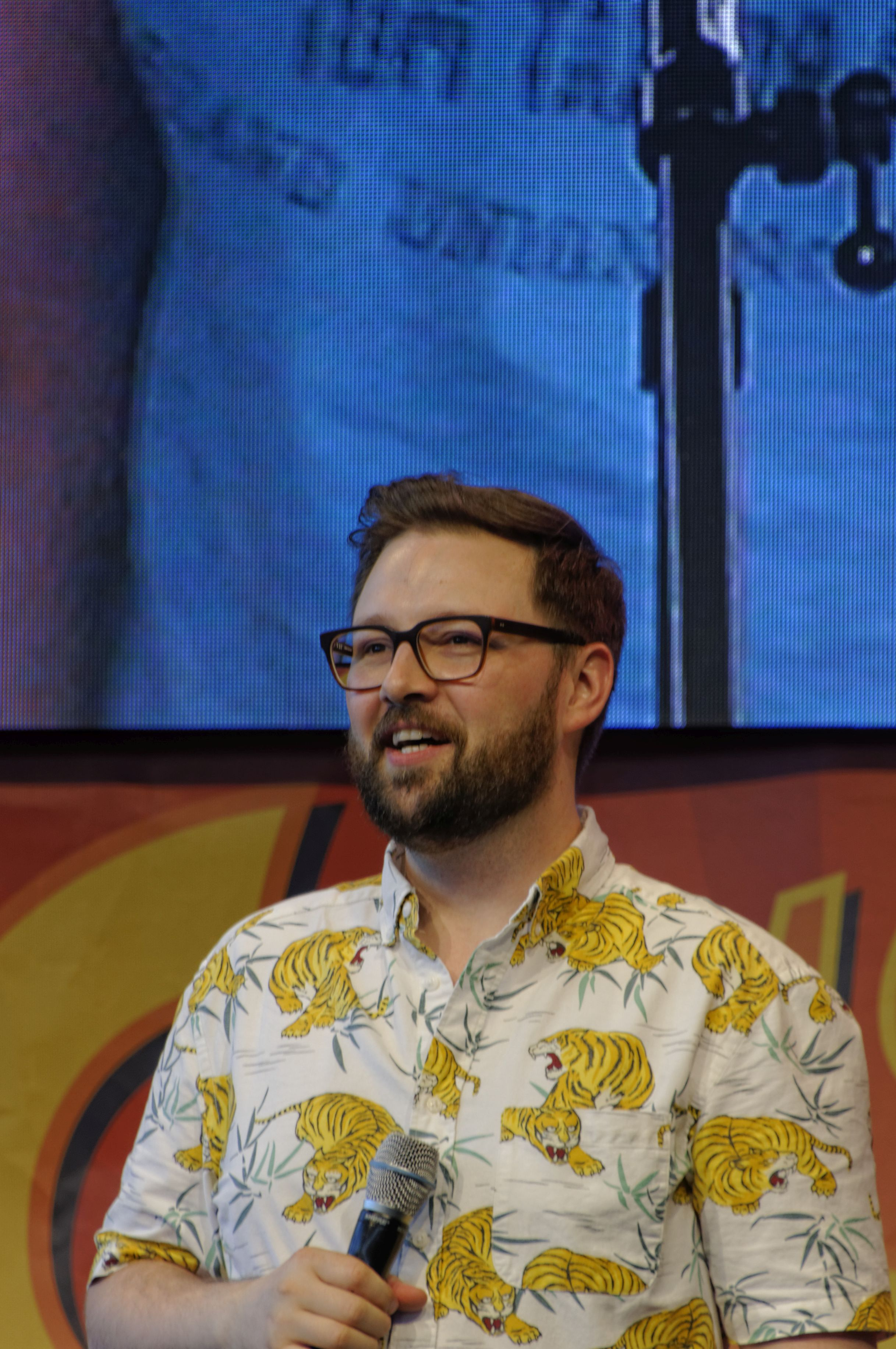 Bilder von der Comic Con Germany in Stuttgart 2018